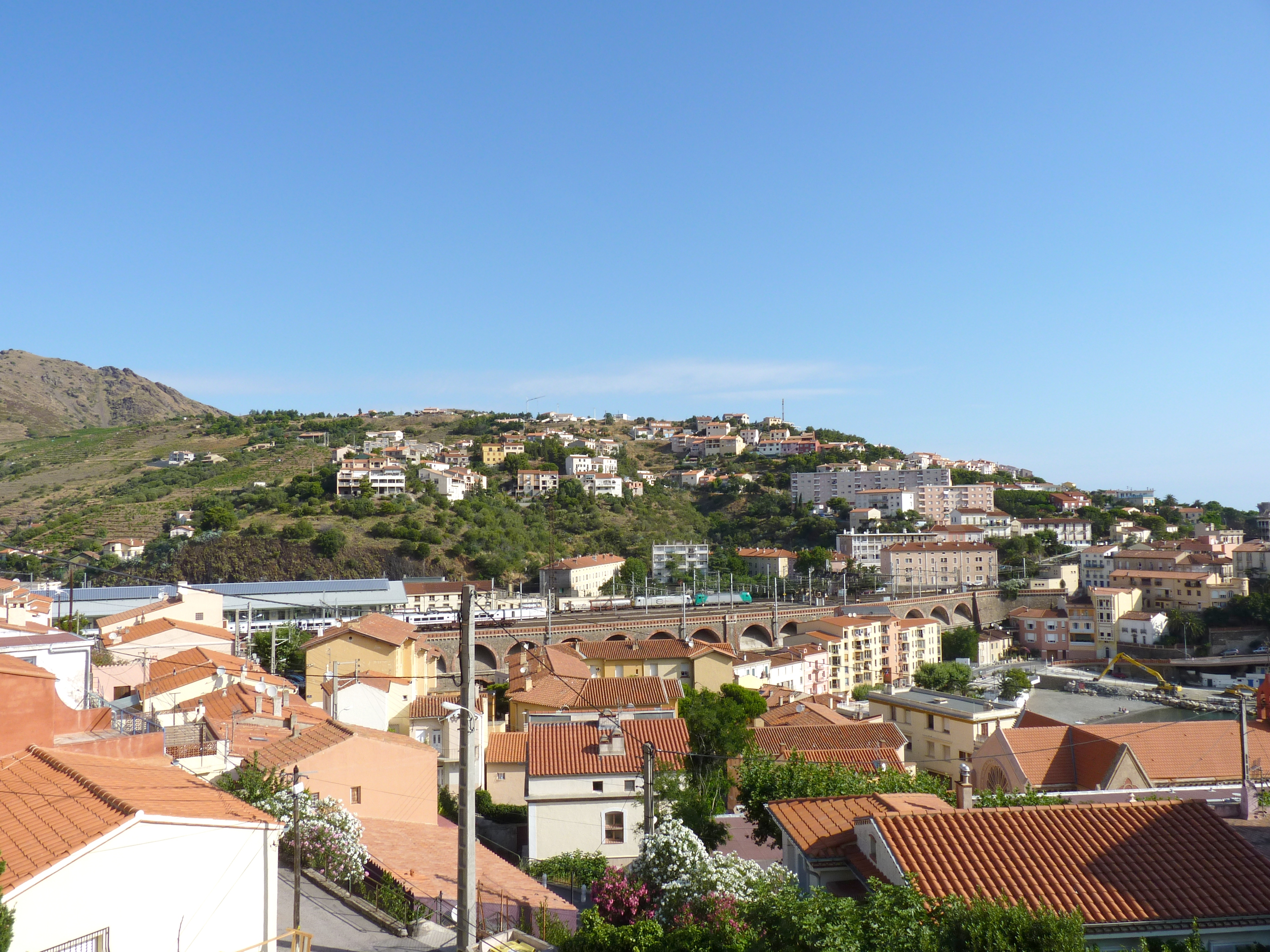 Cerbère (Pyrénées-Orientales, Languedoc-Roussillon, France)